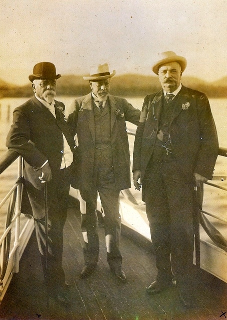 Campos Salles, General Julio Roca e o Barão do Rio Branco em viagem à Petrópolis, 13 de março de 1907. Fotografia, 22 x 15,5 cm. Do álbum "Visita do Presidente da Argentina, General Julio Roca, ao Brasil, março, 1907". Acervo da Mapoteca do Ministério das Relações Exteriores, Rio de Janeiro.